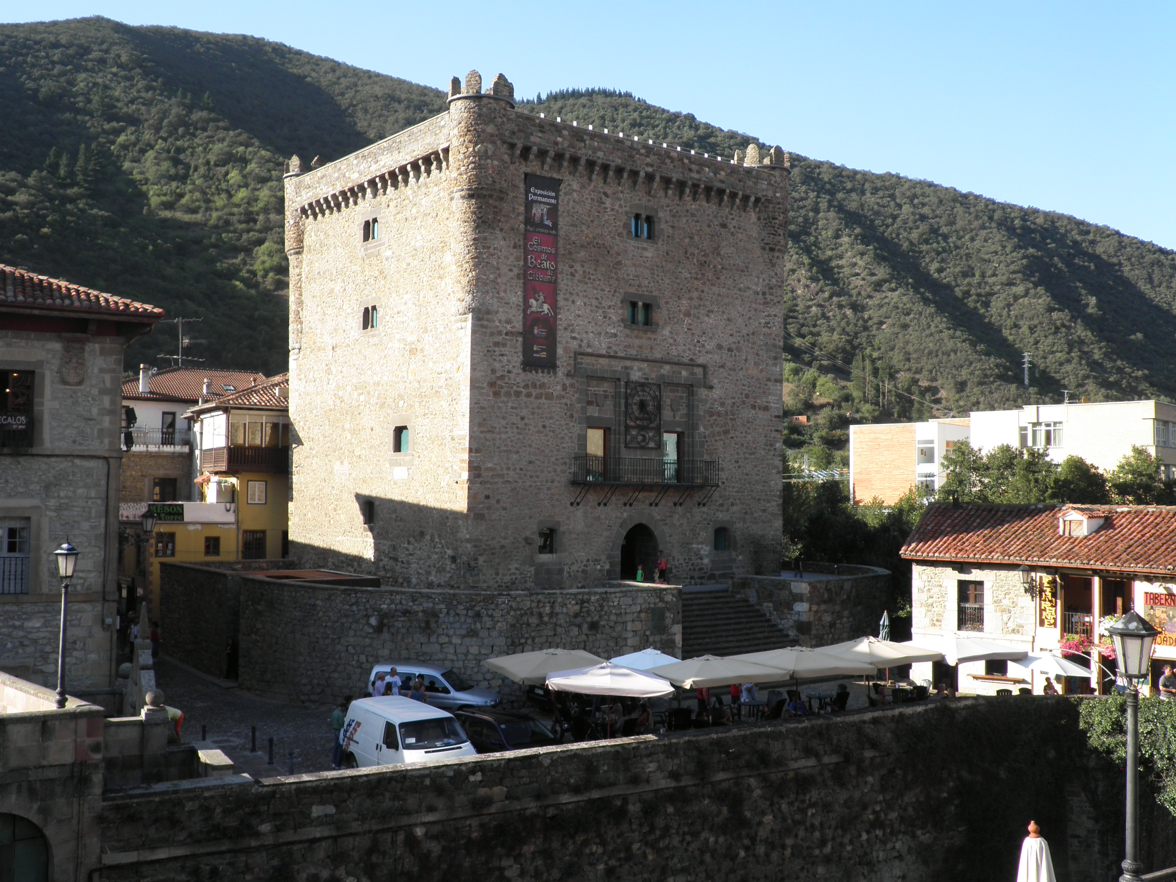 Torre del Infantado a Potes (Liébana, Cantàbria). Segle XIV.